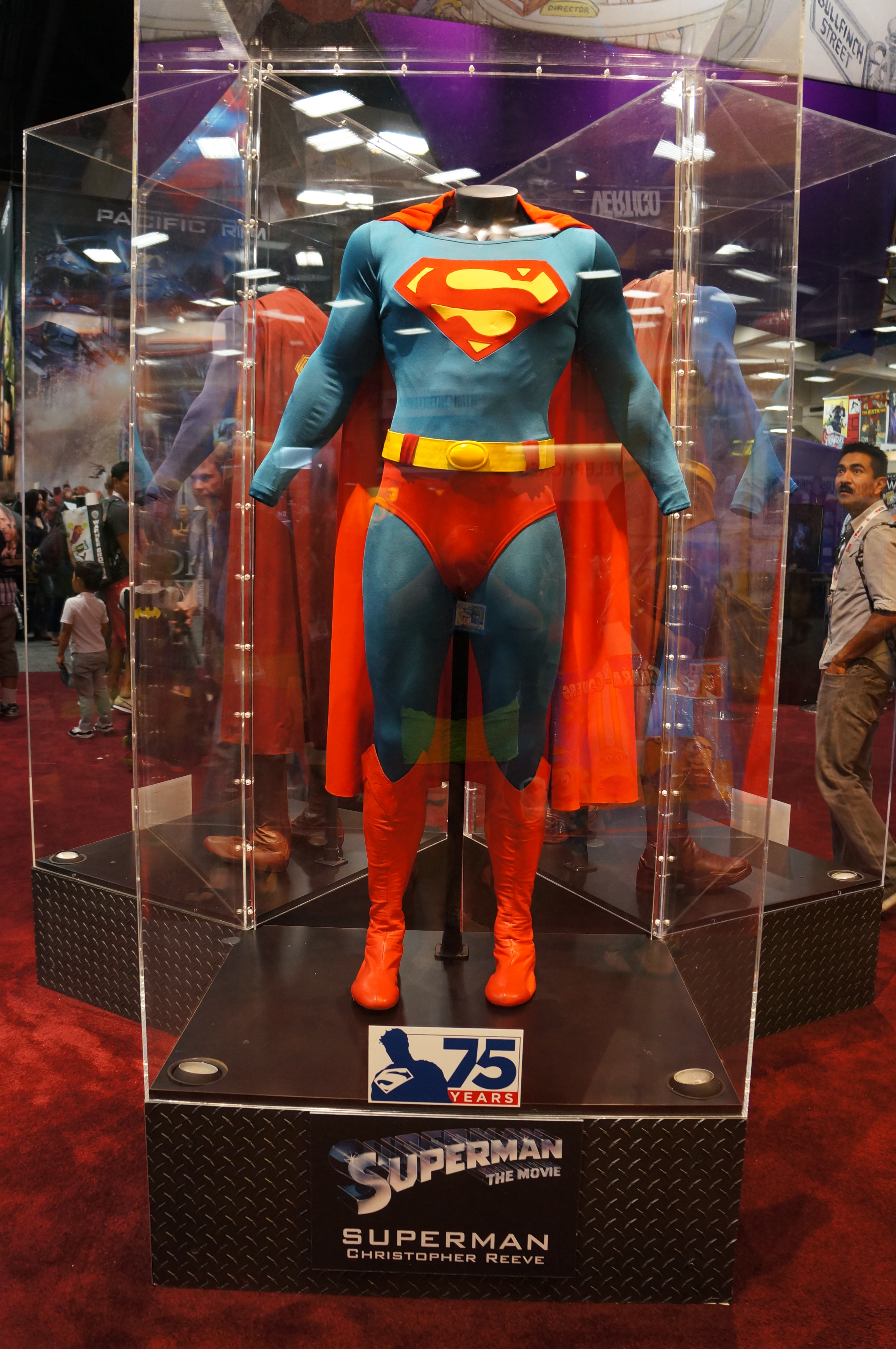 Superman Costumes